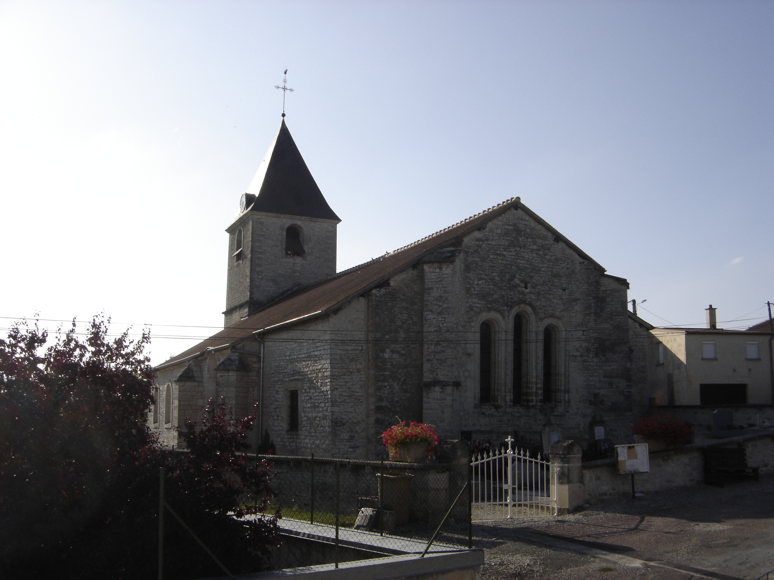 église d'Urville - Aube - France